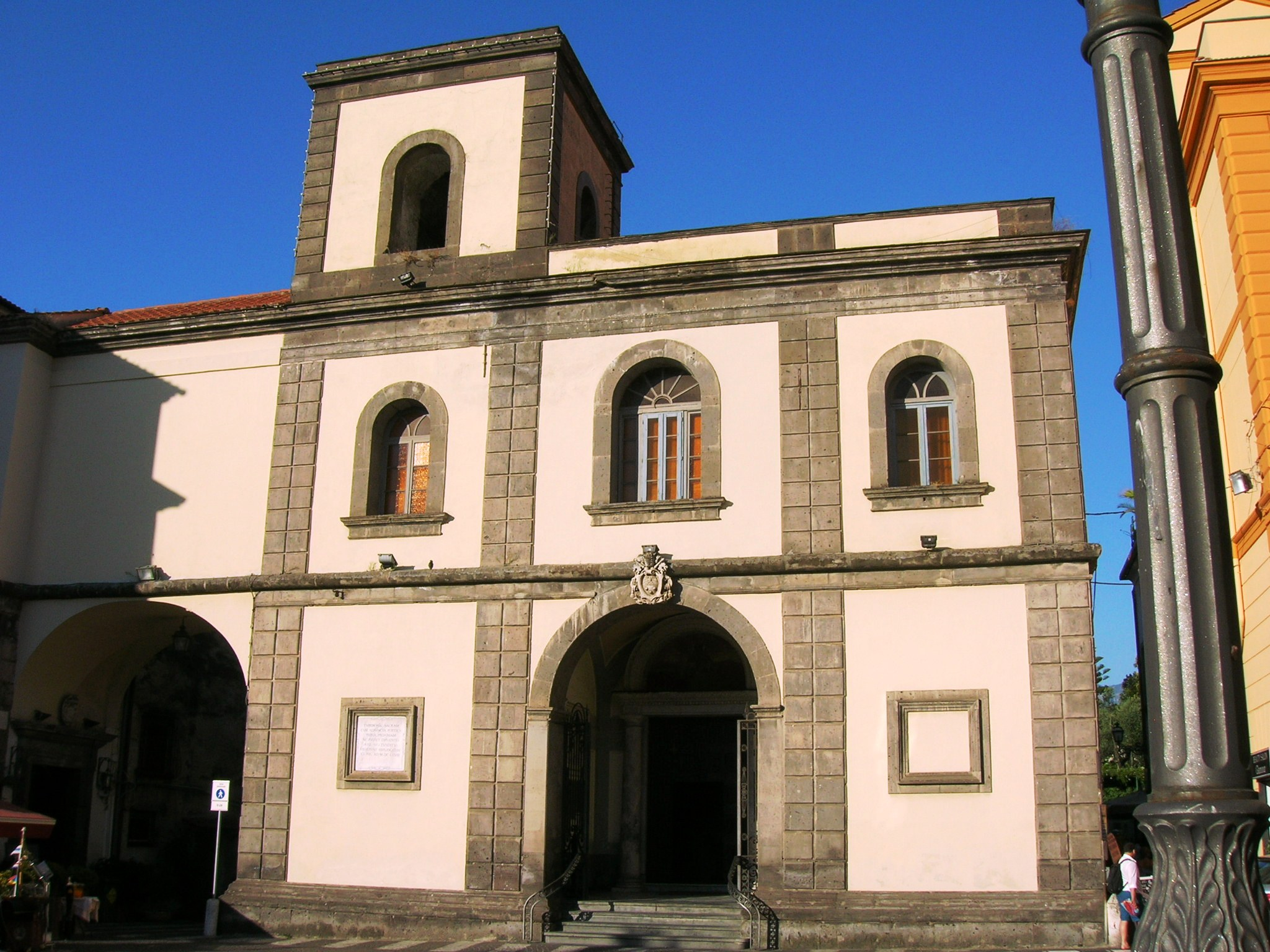 Basilica di Sant'Antonino